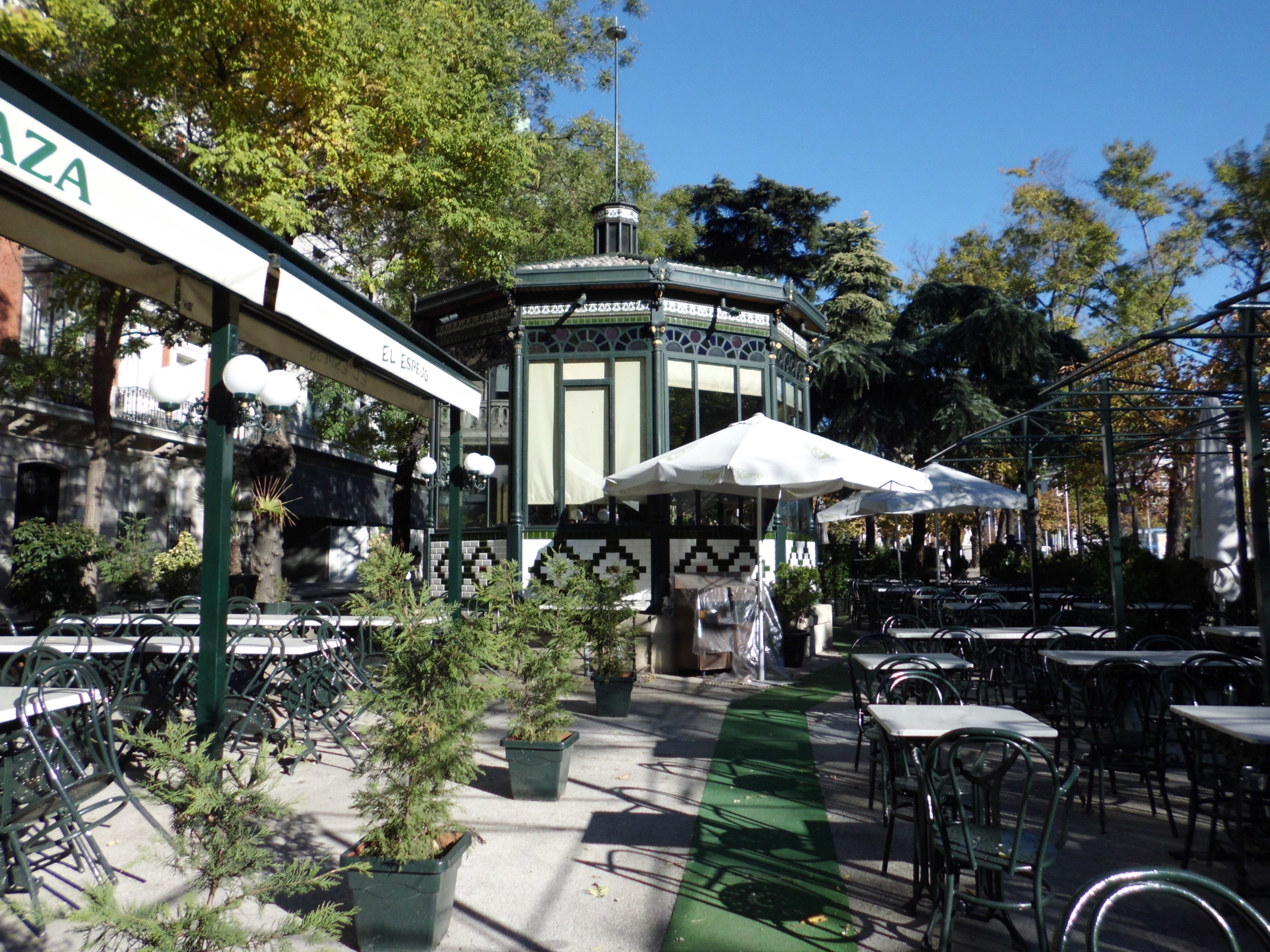 Paseo de Recoletos de Madrid. Kiosco de aperitivos y comidas.